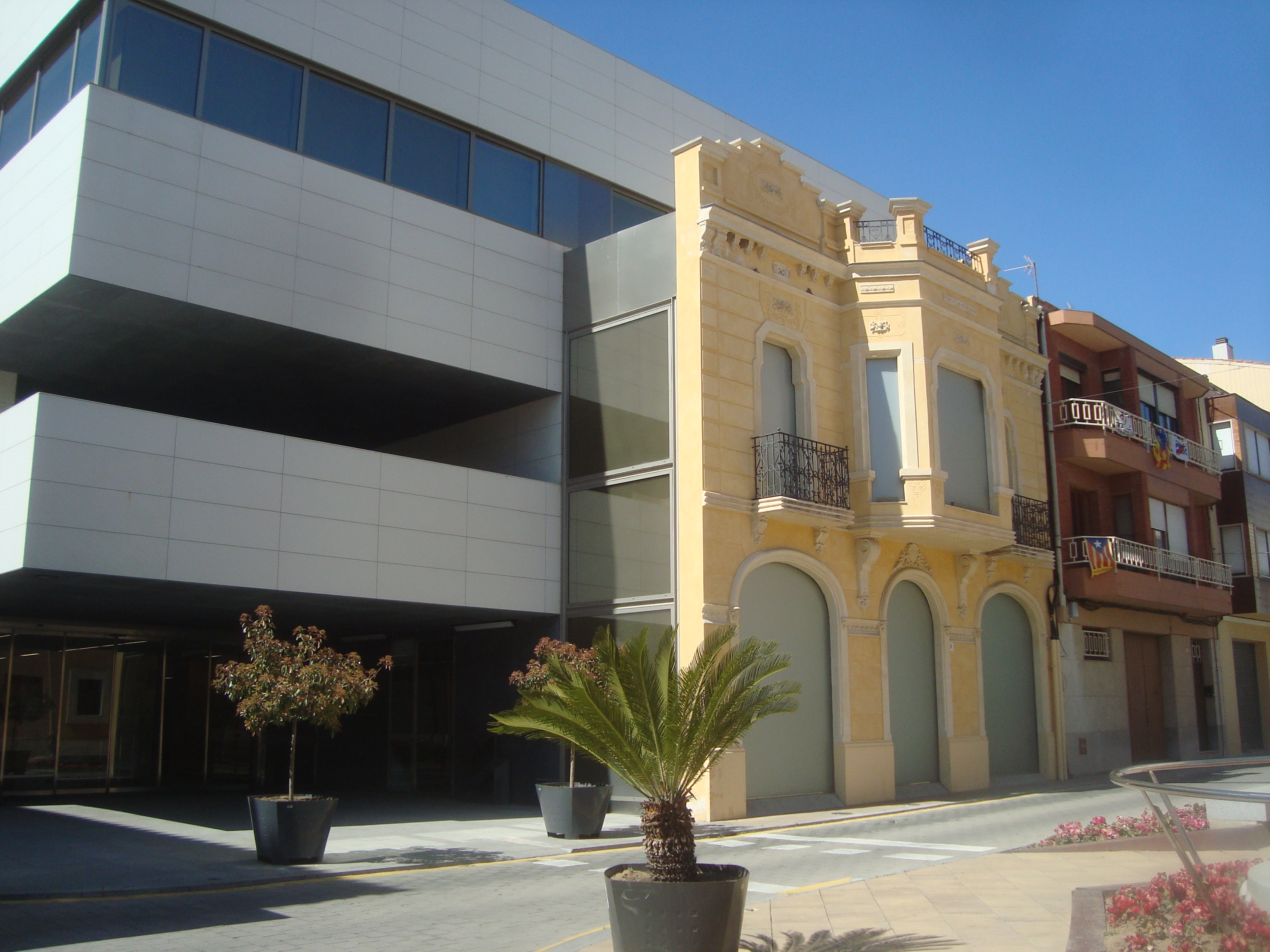 Vista urbana de la Pobla de Mafumet (Tarragona).